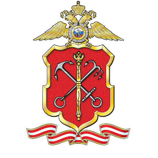 משטרת סנקט פטרבורג